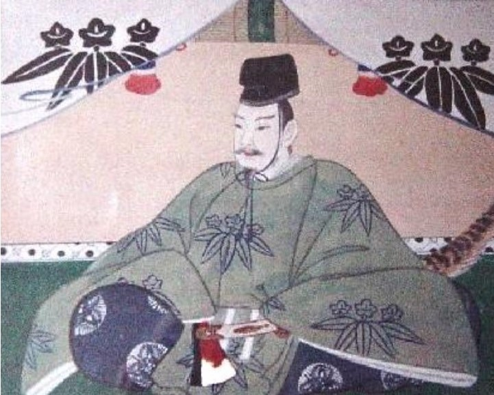 北畠具教の肖像。